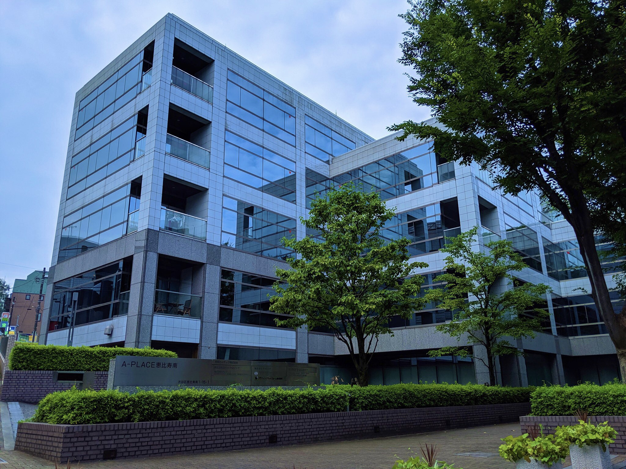 A-PLACE恵比寿南